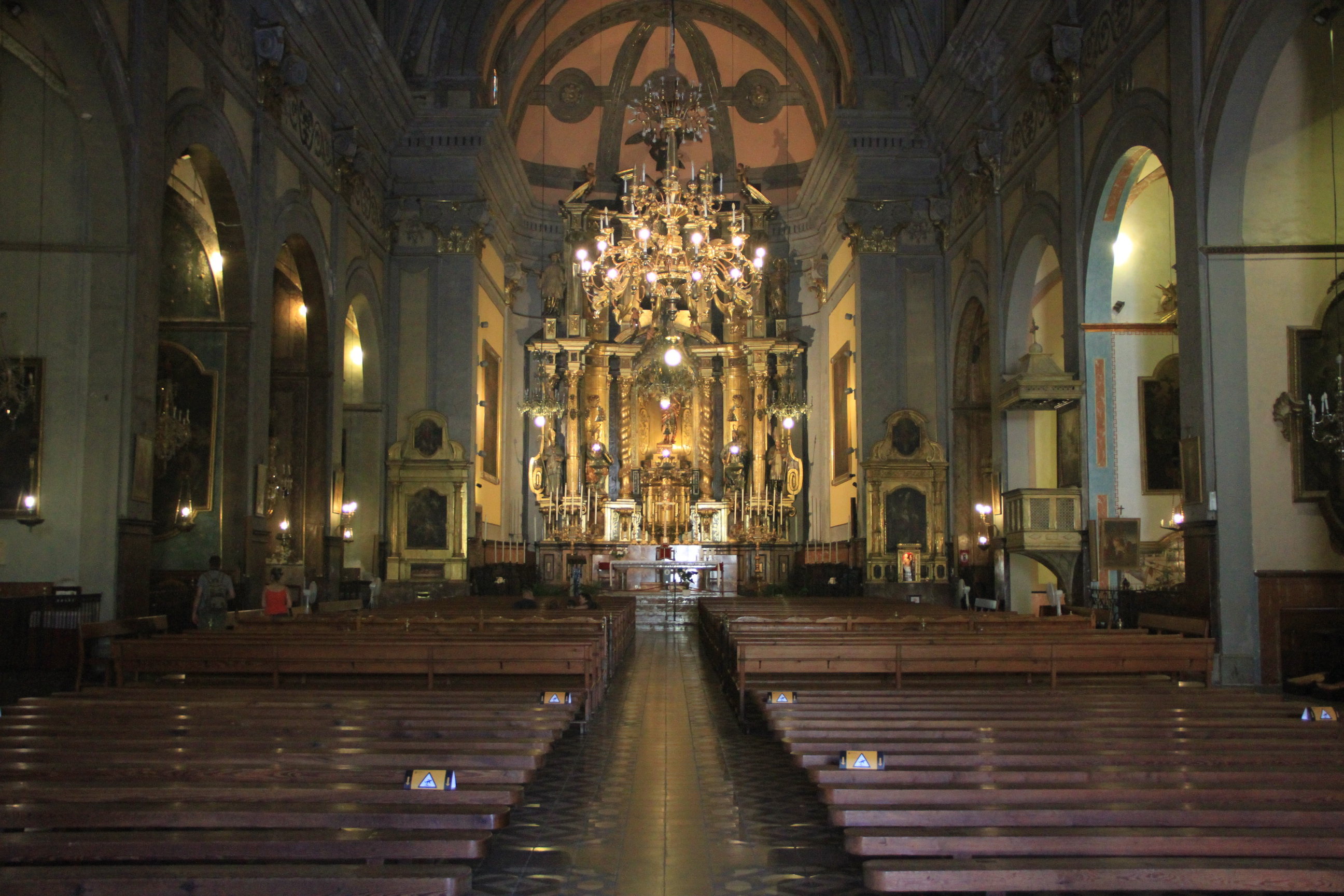 Церква святого Варфоломія (Церква Сант-Бартомеу), Сольєр, Мальорка, Іспанія.